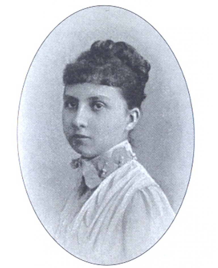 Elvira de Borbón y Borbón-Parma